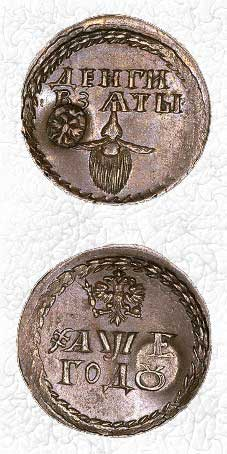 Бородовой знак петровских времён